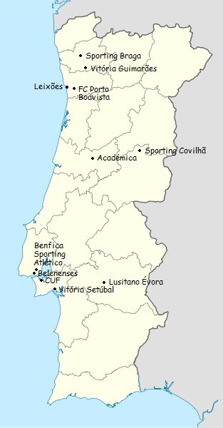 Carta dos clubes participantes do campeonato de portugal de futebol de primeira divisao 1959-1960